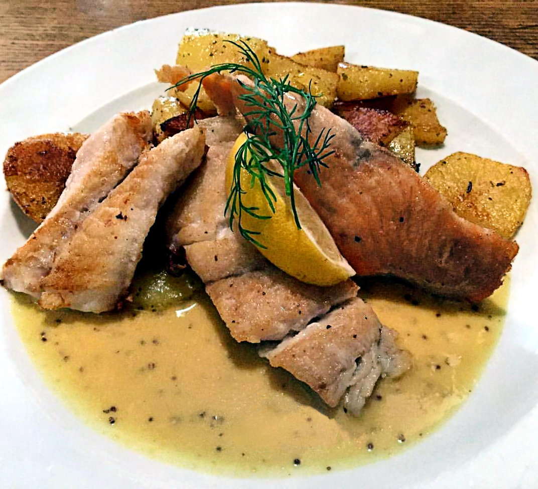 Pannfisch: gebratene Fischfiletstücke, Bratkartoffeln, Senfsoße.Hier in dem von Küchenchef Ralf Haug geführten Sterne-Restaurant freustil im Hotel Vier Jahreszeiten in Binz auf Rügen in Mecklenburg-Vorpommern, Deutschland.